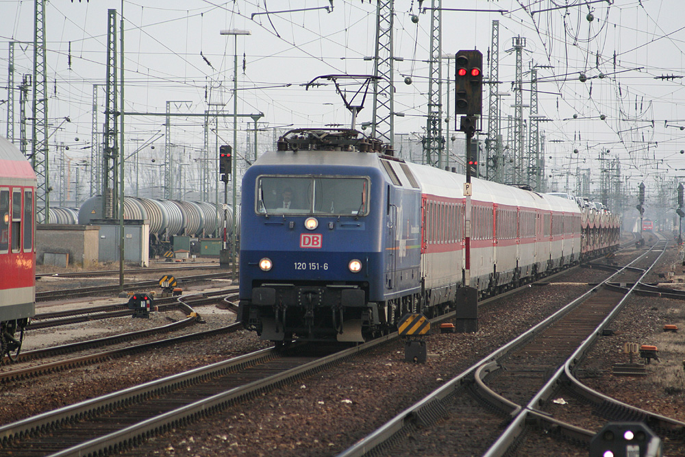 Autozug 1420 in Ingolstadt Hauptbahnhof